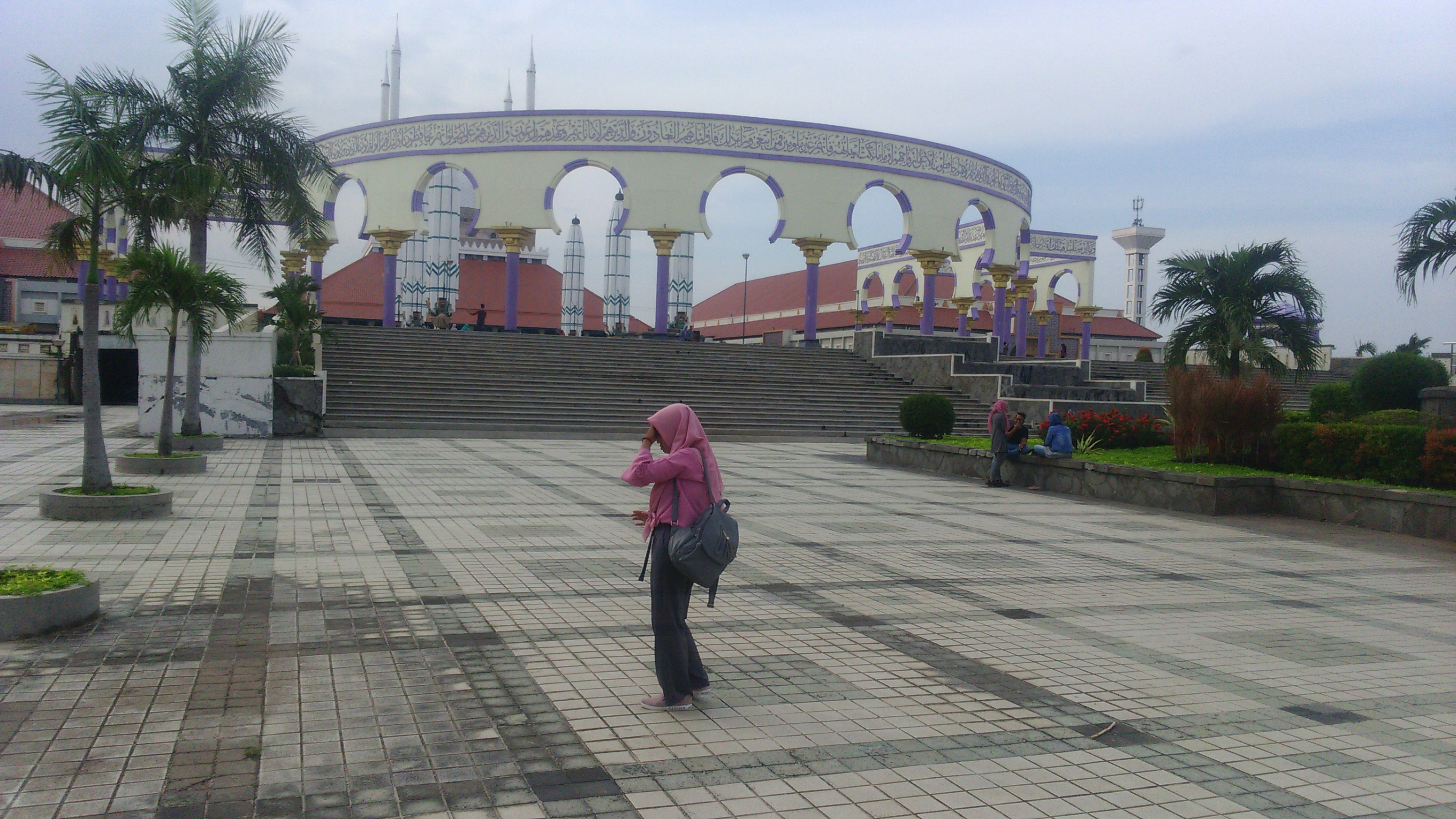 Basa Jawa: Masjid Agung Jawa Tengah iki panggoné ana ing Semarang, panggoné ora adoh karo Universitas PGRI Semarang lan Universitas Diponegoro. Sing narik kawigatèn saka masjid iki yaiku payon kang bisa mbukak lan nutup kaya masjid ing Mekkah.